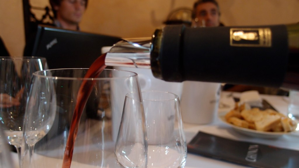 Bec verseur à vin de la marque Drop Stop